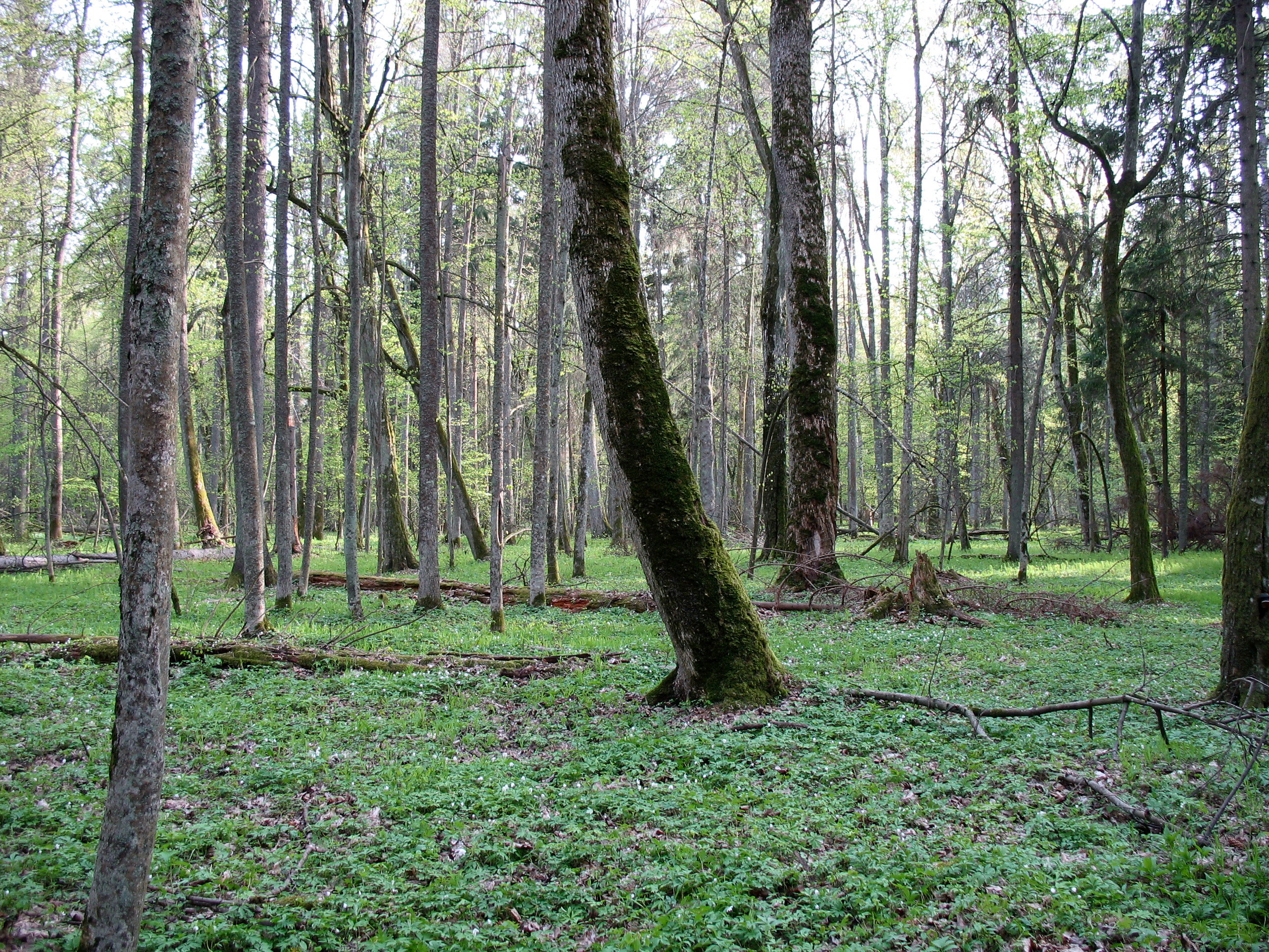 Rezerwat ścisły w Puszczy Białowieskiej